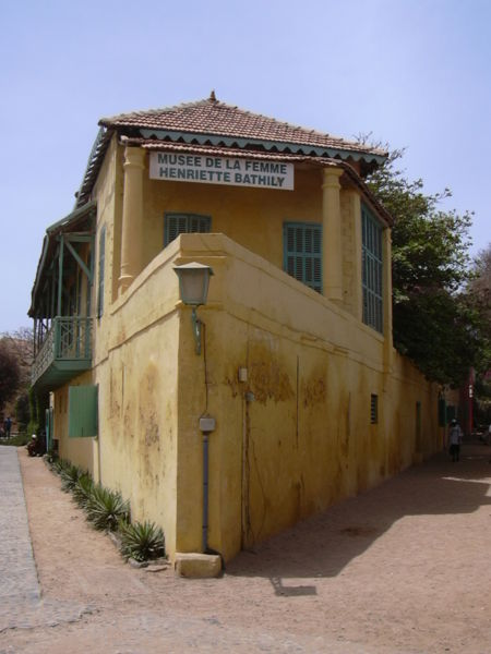 Maison de la signare Victoria-Albis à l'île de Gorée (Sénégal), qui abrite aujourd'hui le Musée de la Femme Henriette Bathily